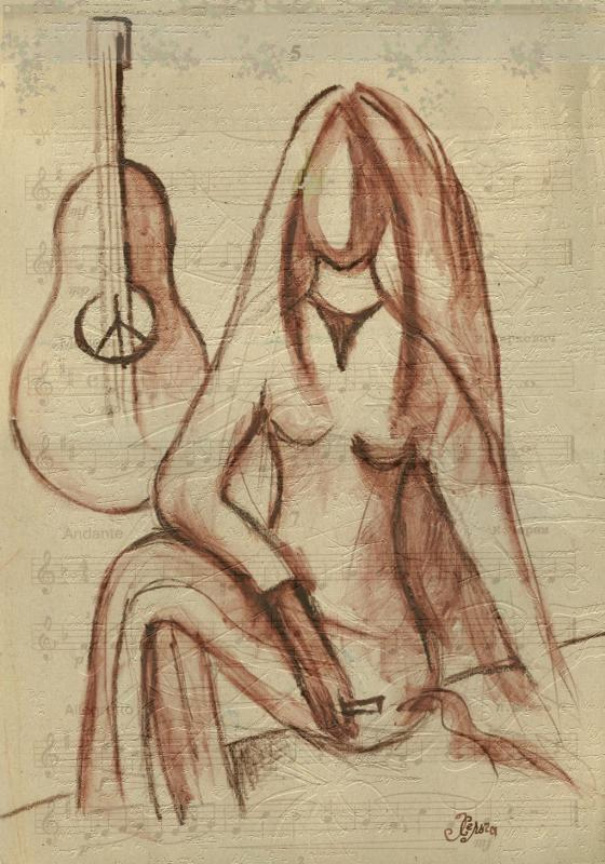 Description вашего изображения